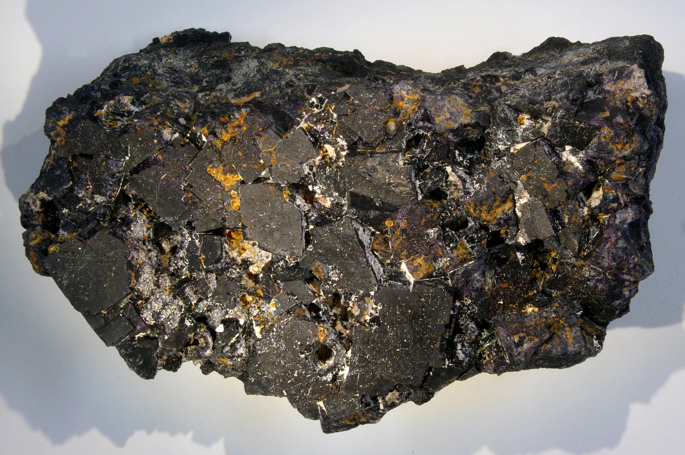 Fluorite (Antozonite). Wölsendorf, Oberpfalz, Southern Germany